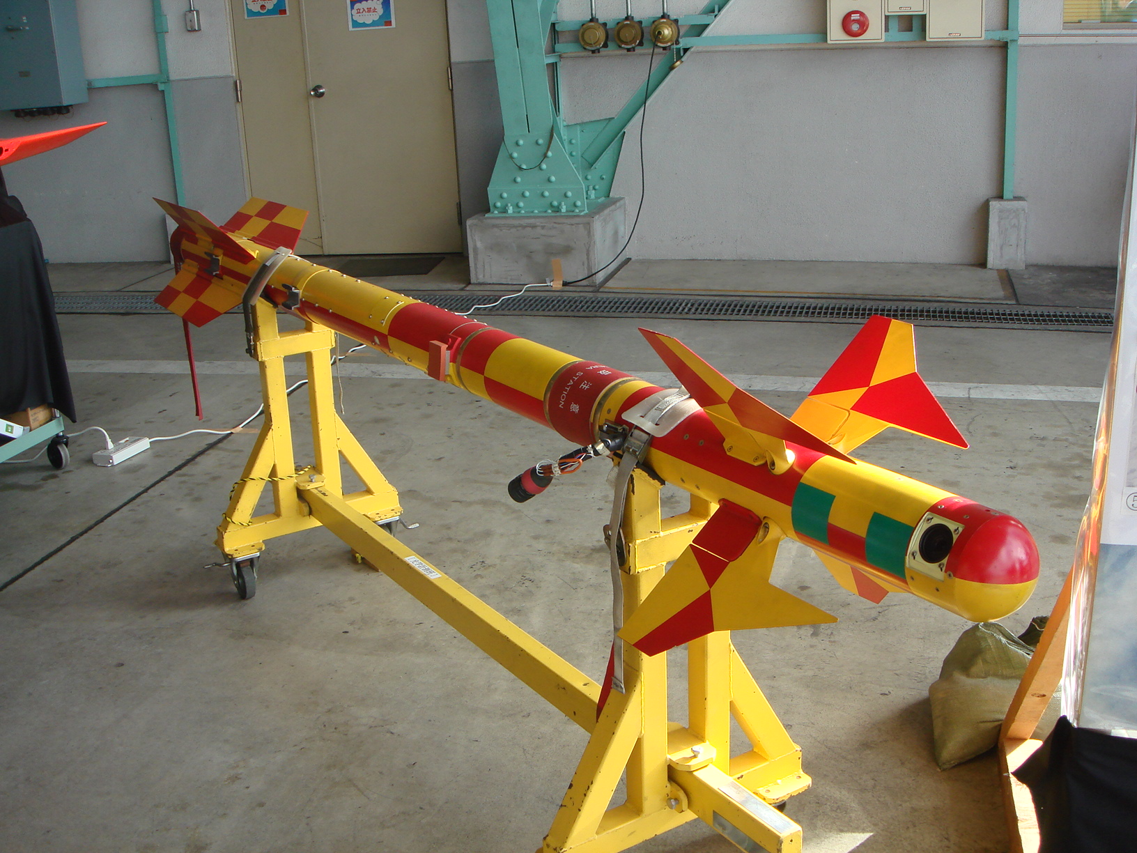 航空自衛隊 AAM-3改造カメラポッド。2008年11月30日 航空自衛隊岐阜基地にて。